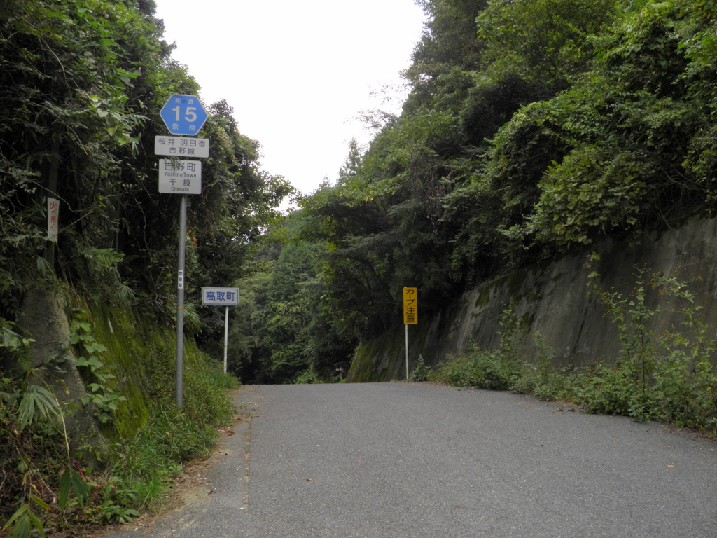 芋ヶ峠（奈良県吉野郡吉野町）